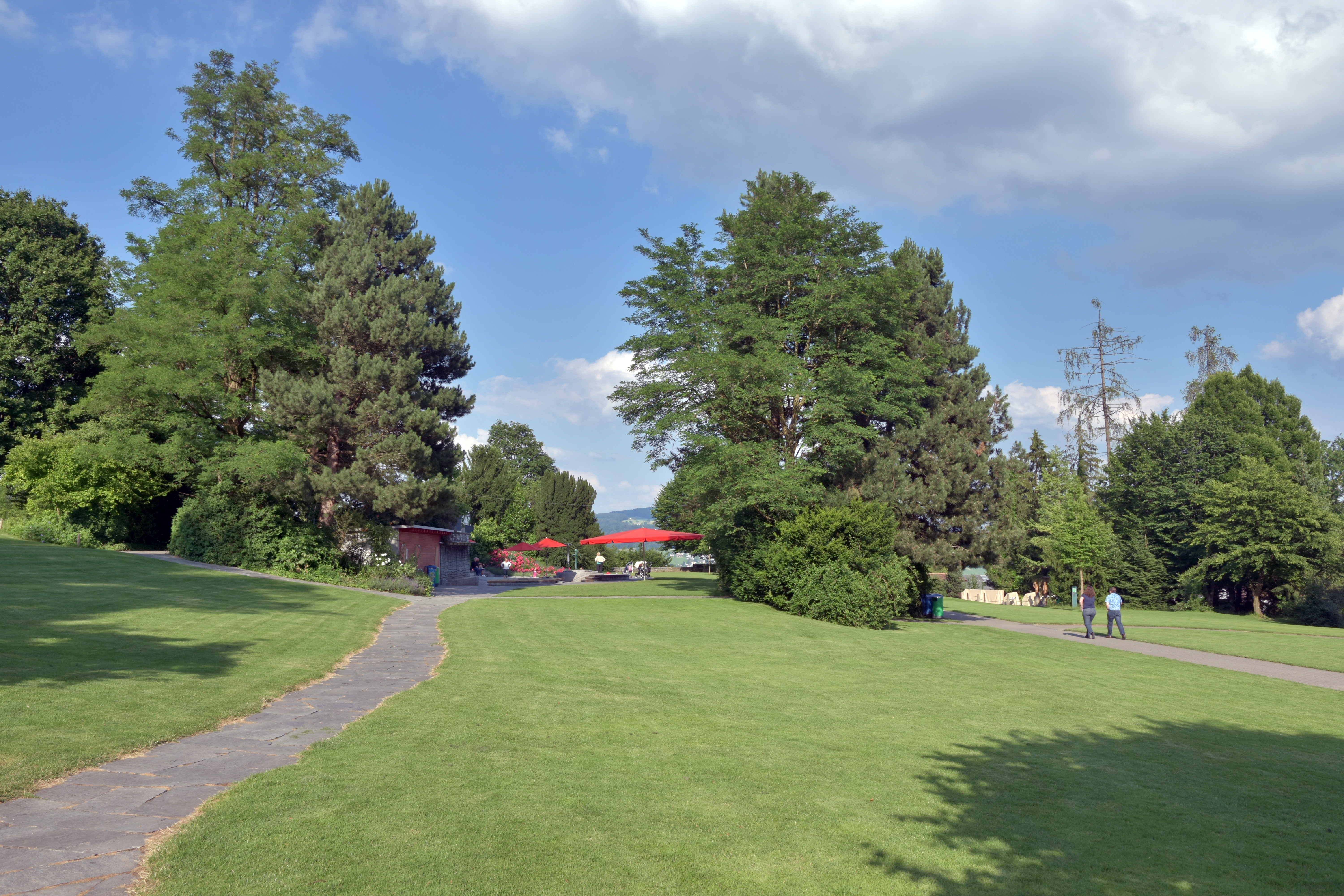 Adele & Gottlieb Duttweiler's' Park im Grüene in Rüschlikon (Switzerland)